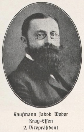 Jacob Weber (1872-1944) Zentrumspolitiker und Unternehmer in Essen.